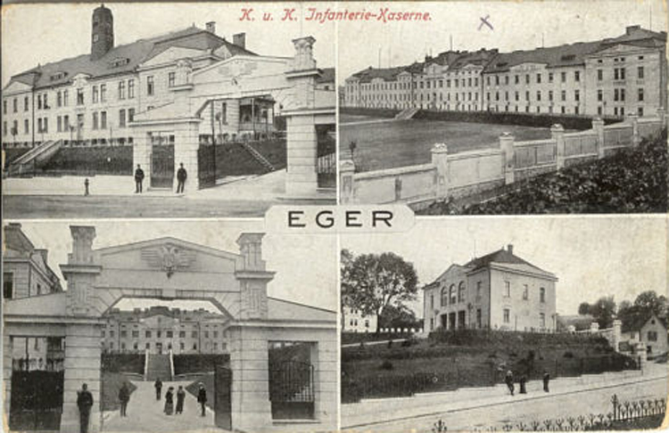 Kaserne des k.u.k. Infanterie-Regiments Nr. 73 in Eger in Böhmen